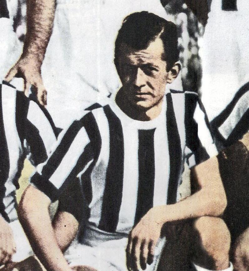 Il calciatore italiano Ermes Muccinelli alla Juventus nella stagione 1951-52.